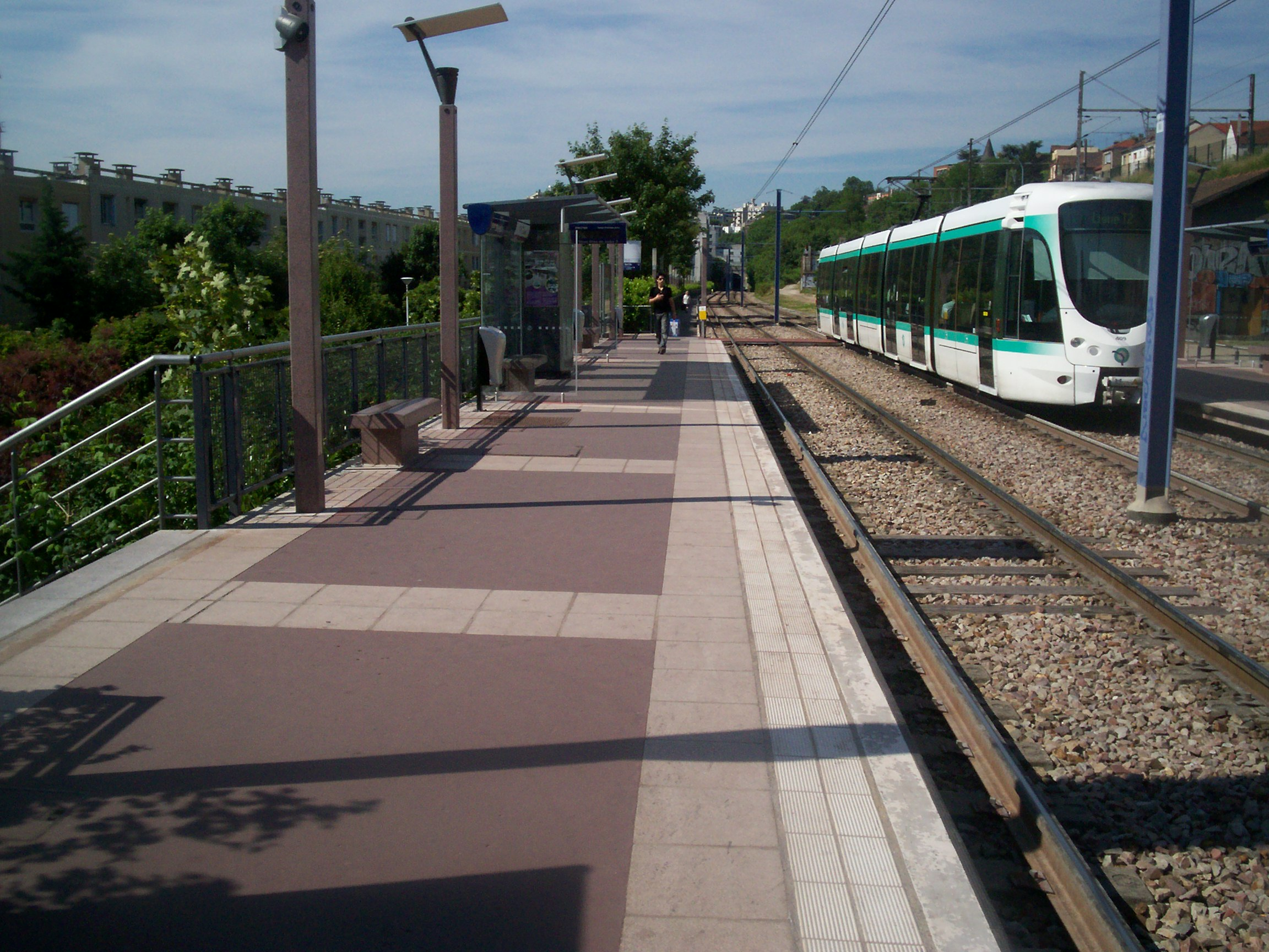 Paris Tramway ligne 2